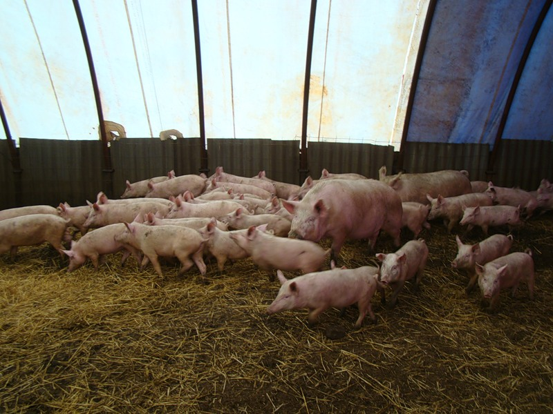 Свиноферма в Волгоградской области